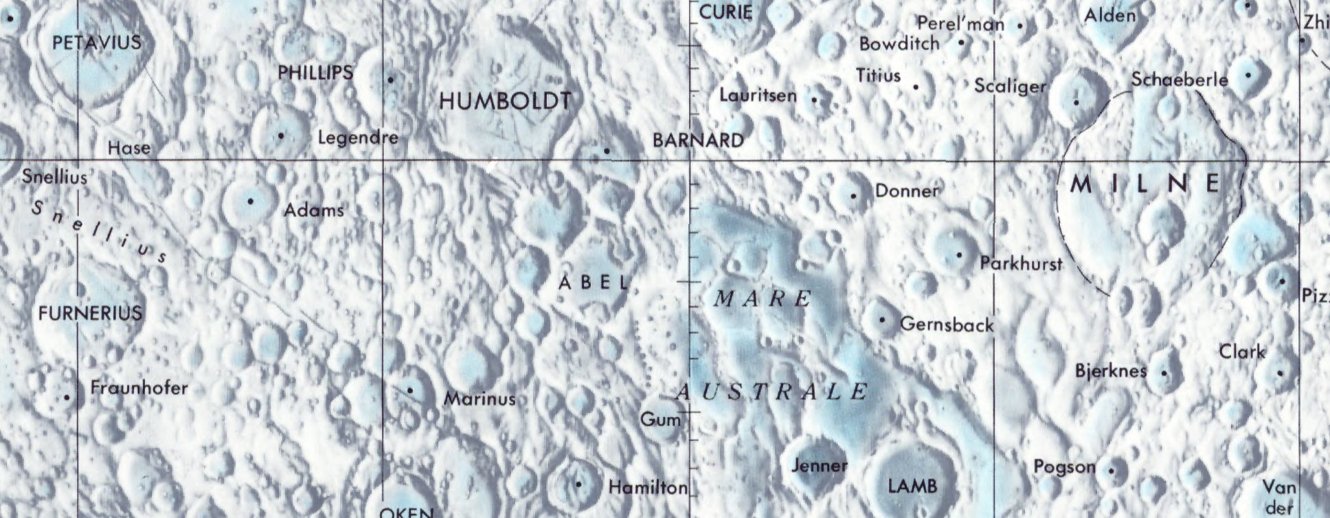 Cráter lunar Abel. Localización. (Lunar Chart LPC1. Second Edition)